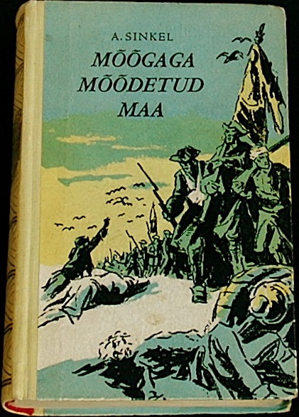 Aristarch Sinkeli romaani "Mõõgaga mõõdetud maa" esikülg